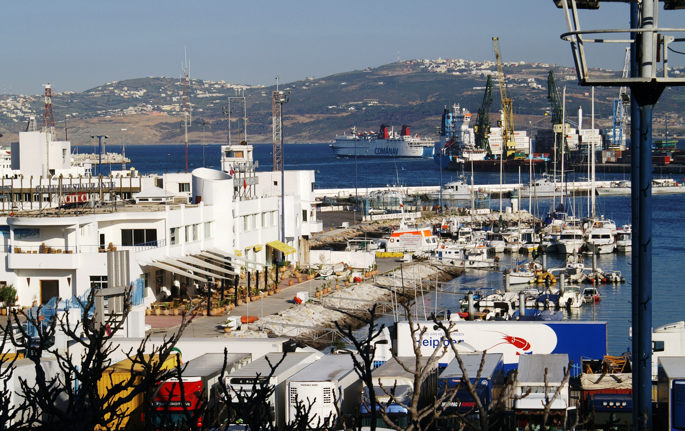 Haven van Tanger Marokko